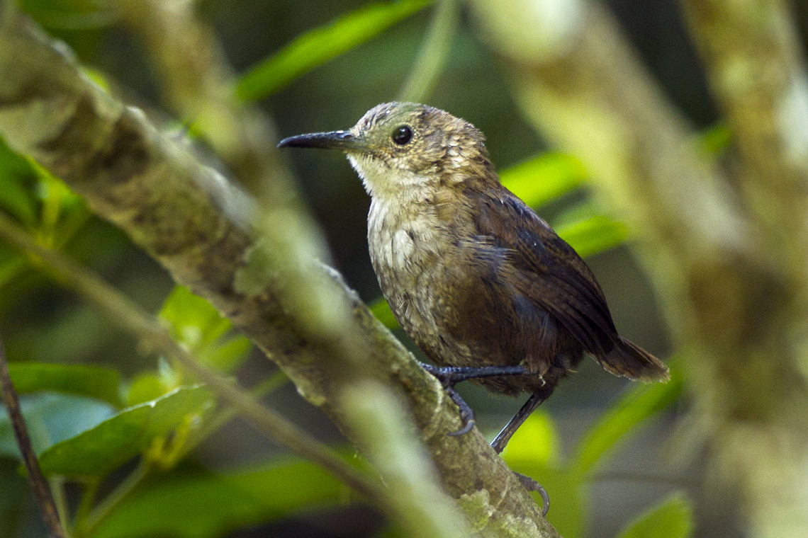 Nava'a Wren - Chiapas - Mexico_S4E7498